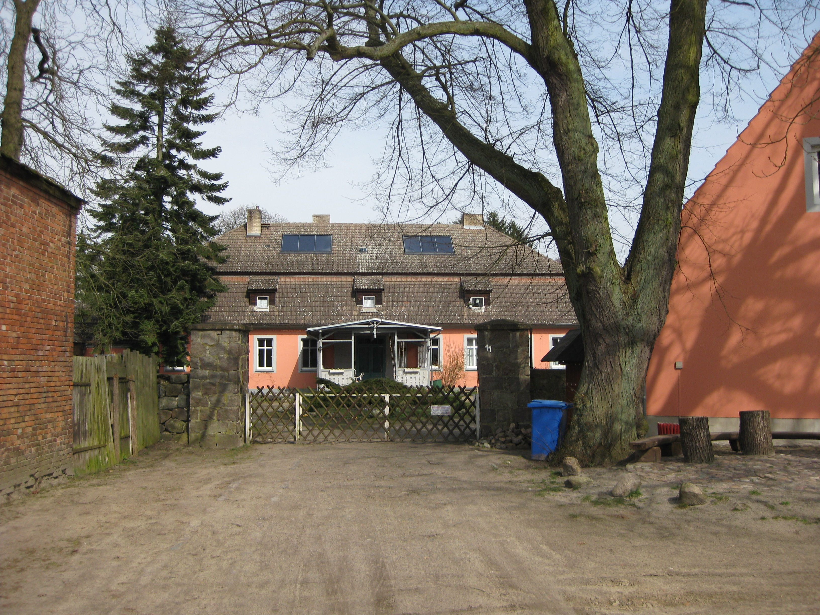 1704 in der unmittelbaren Nähe der Burg Grimnitz erbaute Försterei Grimnitz (Joachimsthal i. Barnim), heute Kommunität Grimnitz.